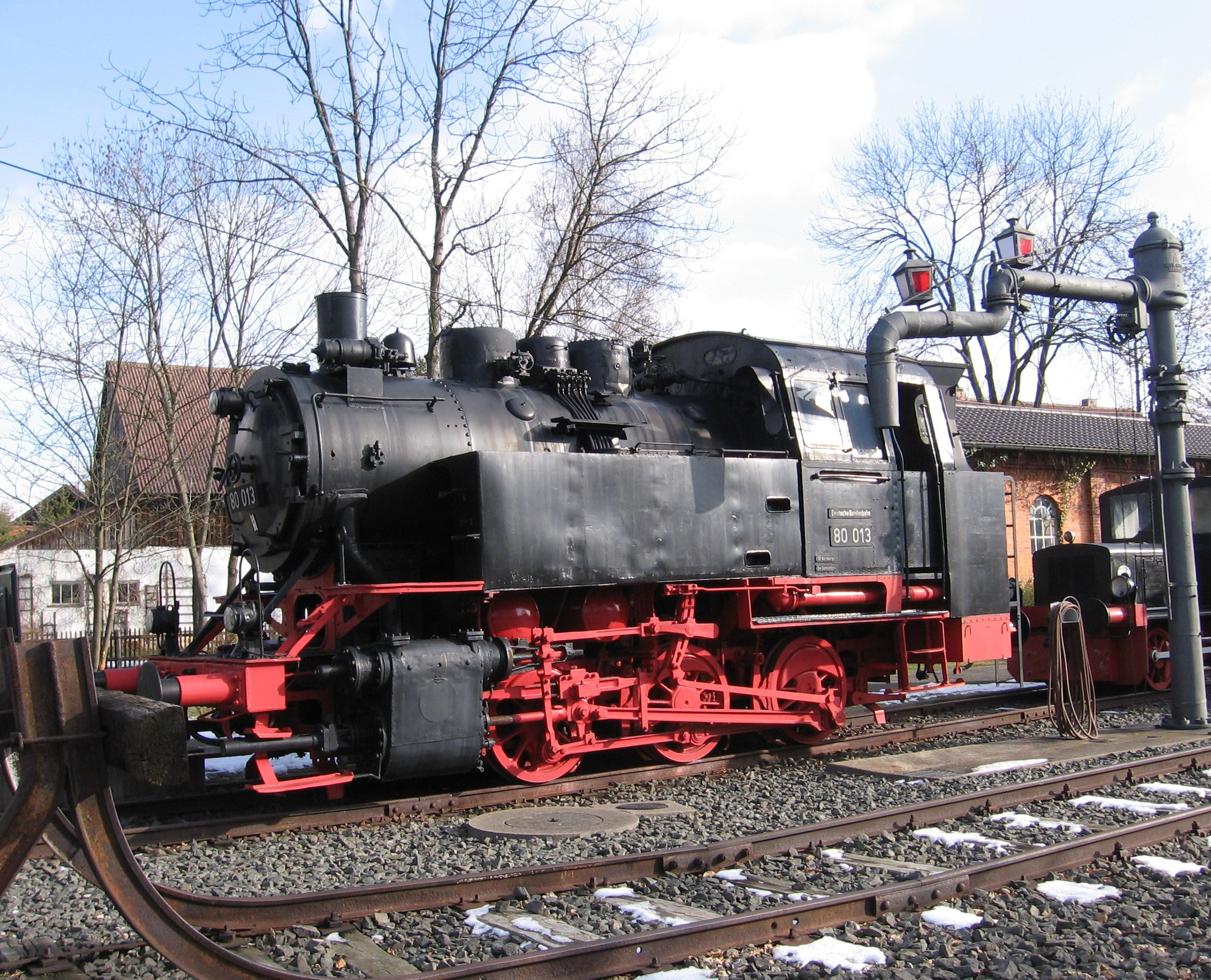 Dampflok Baureihe 80 im Dampflokmuseum Neuenmarkt.